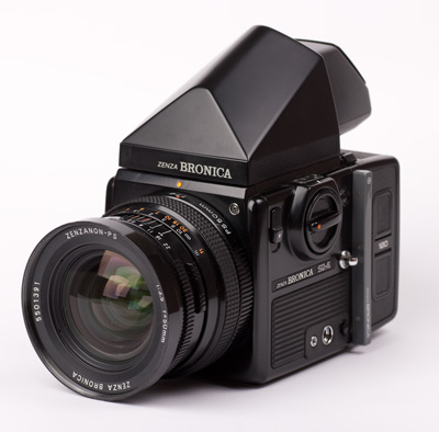 Bronica SQ-Ai with Zenzanon-PS 50/3.5 and 45D Prism Viewfinder